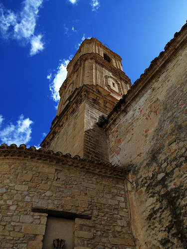 Campanar de l'església de l'Assumpció del Forcall, als Ports.